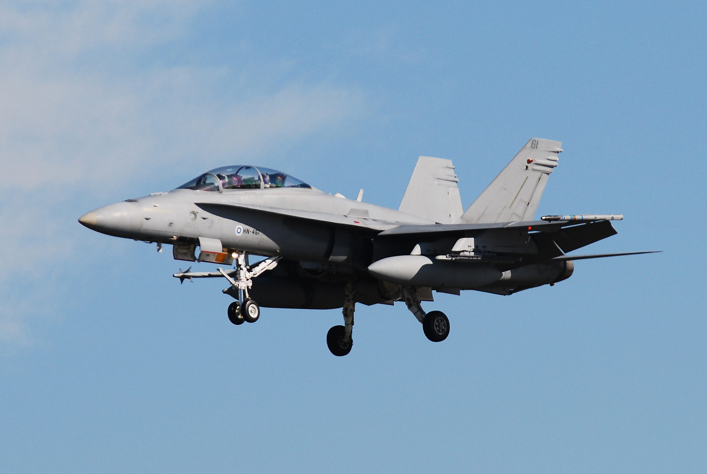 imx00000383